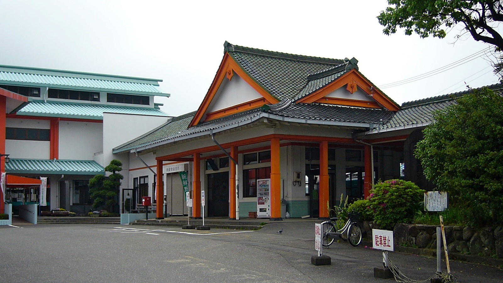 Nachi Station in Nachikatsuura, Wakayama prefecture, Japan